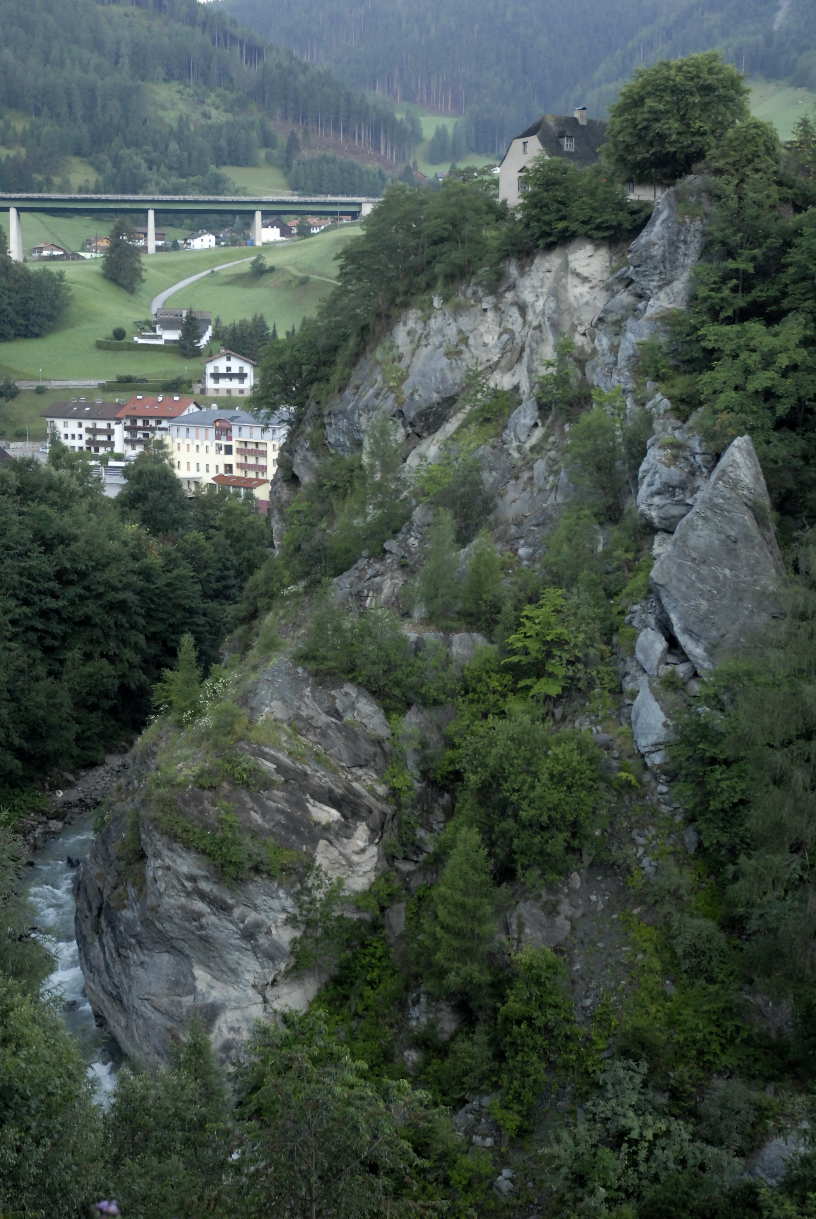 Burg Trautson in Mühlbachl mit der Sill